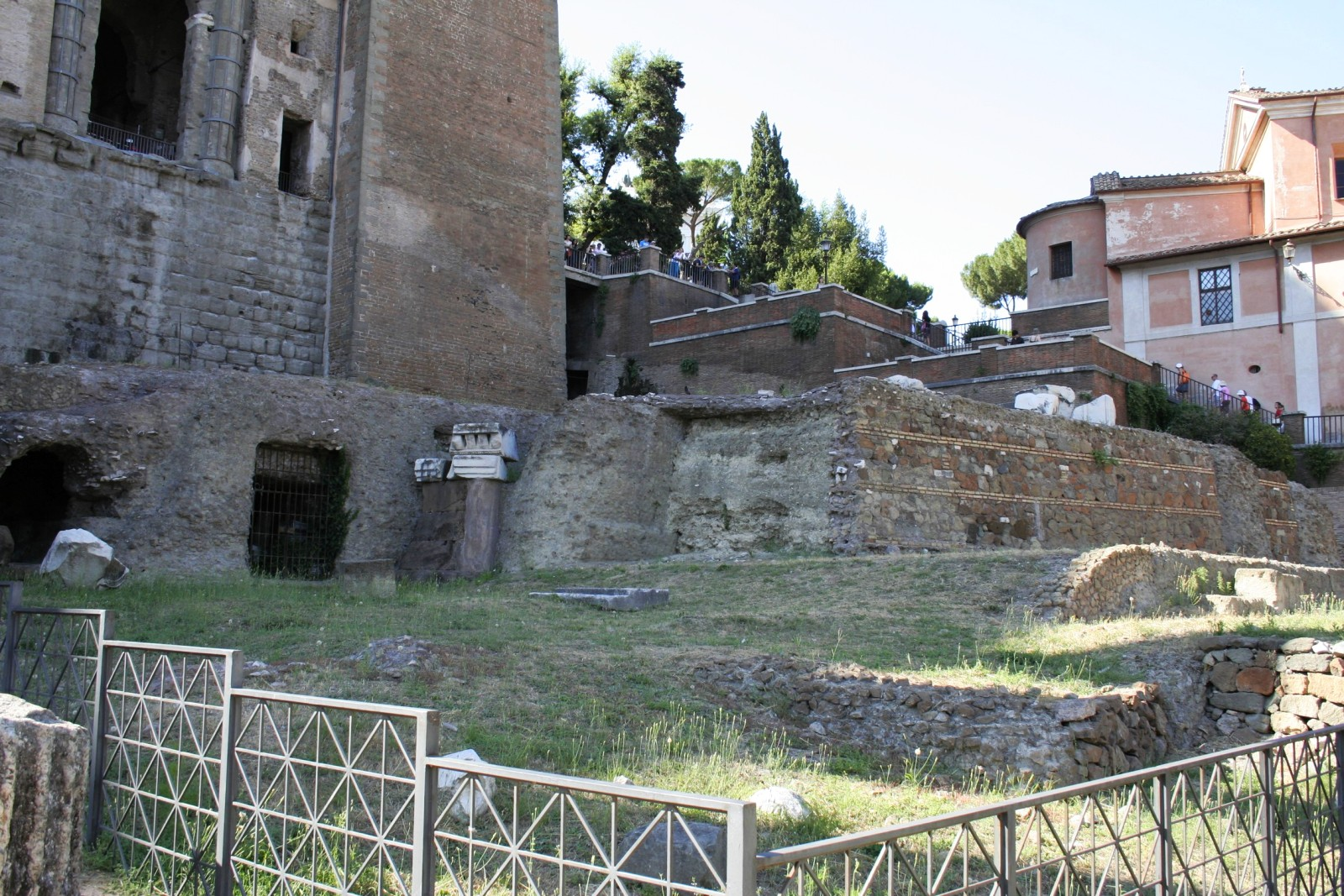 Vestiges du temple de la Concorde, Forum Romanum.